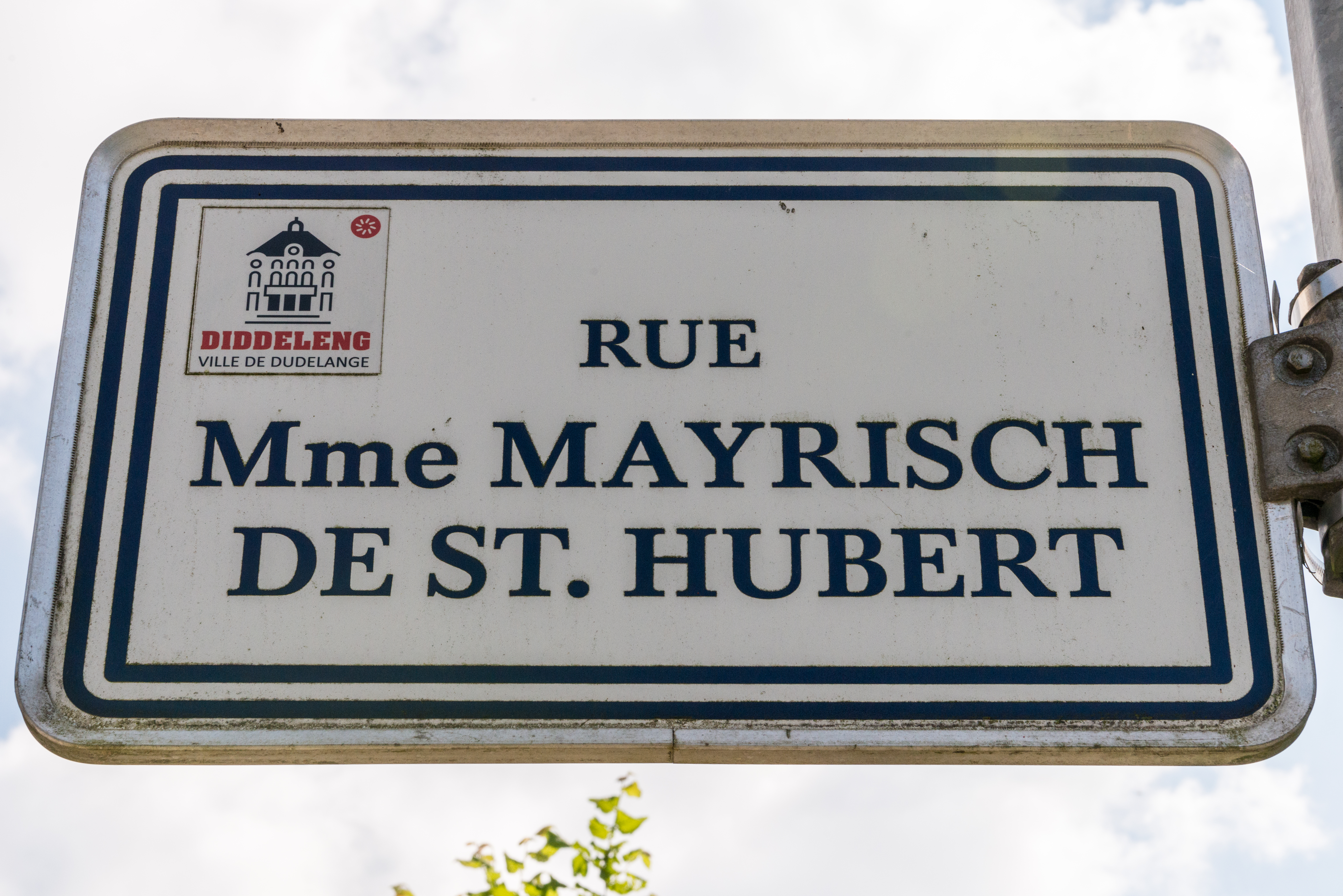 Stroosseschëld zu Diddeleng.